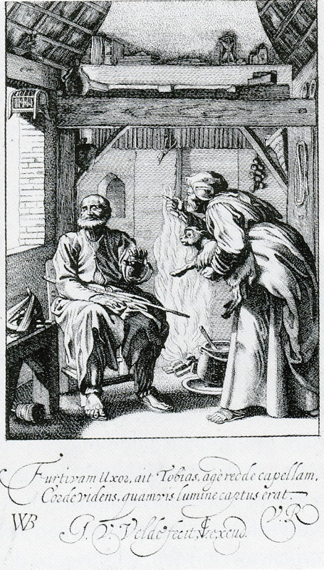 Jan van de Velde II after Willem Buytewech Anna and Tobit 147 x 104 mm Engraving